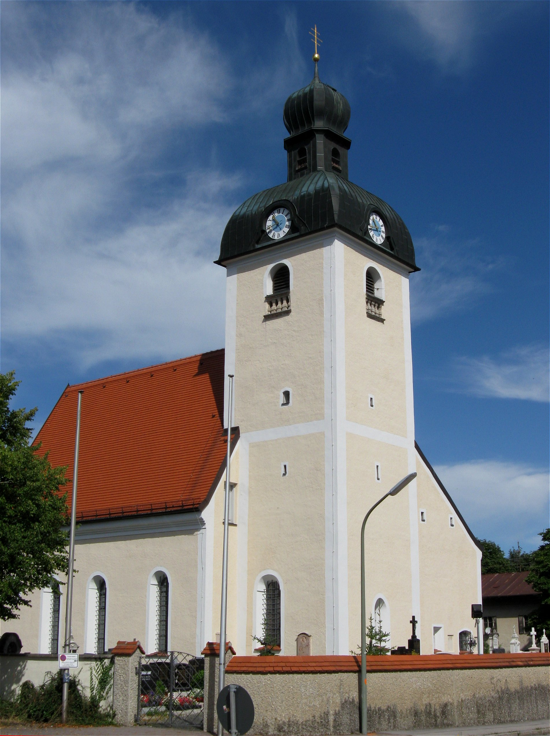 Kath. Pfarrkirche St. Michael, Egmating; romanische Chorturmanlage, um 1200, Ausbau spätmittelalterlich und 1618; mit Ausstattung.